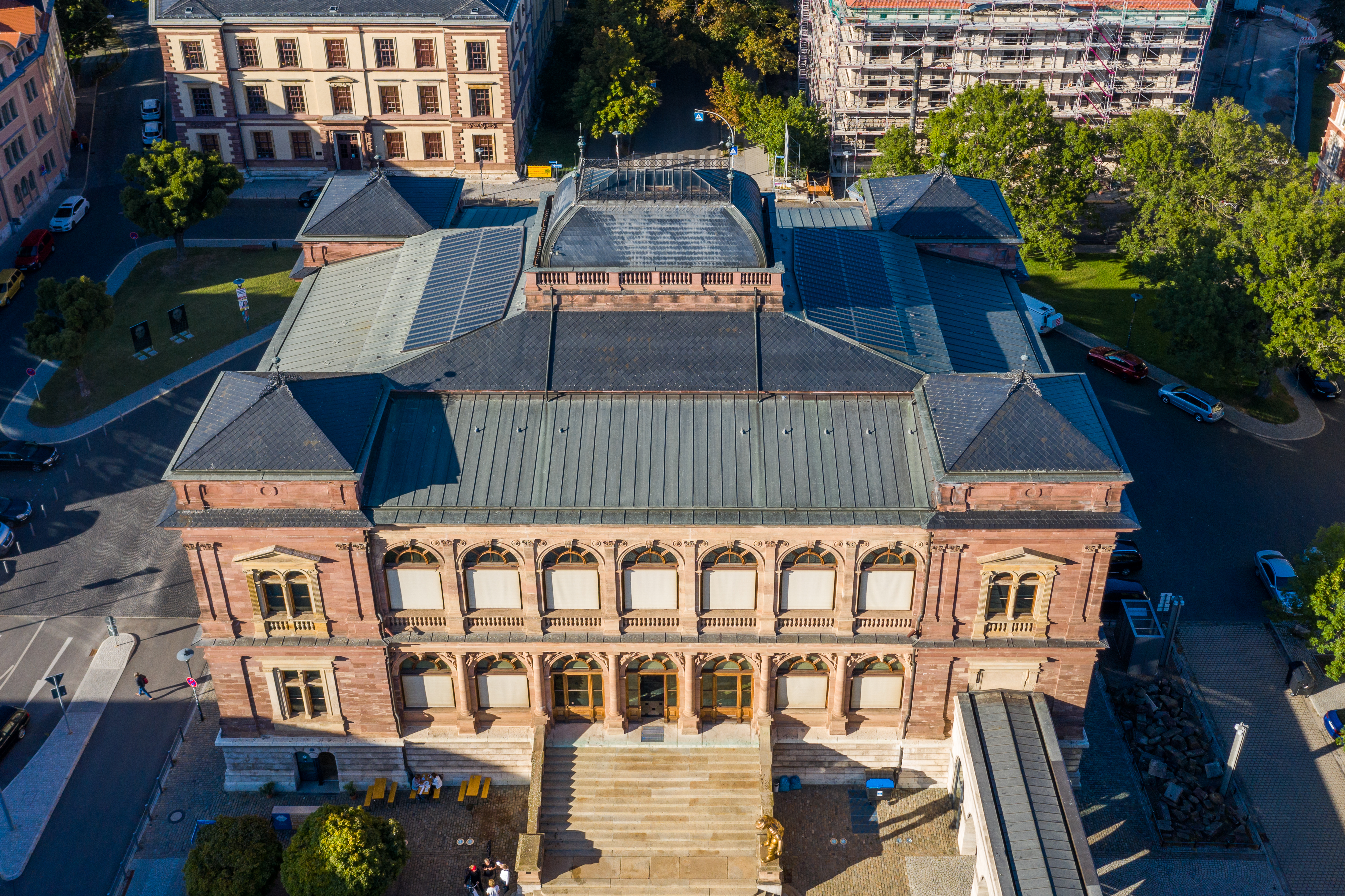 Luftbild Neues Museum Weimar